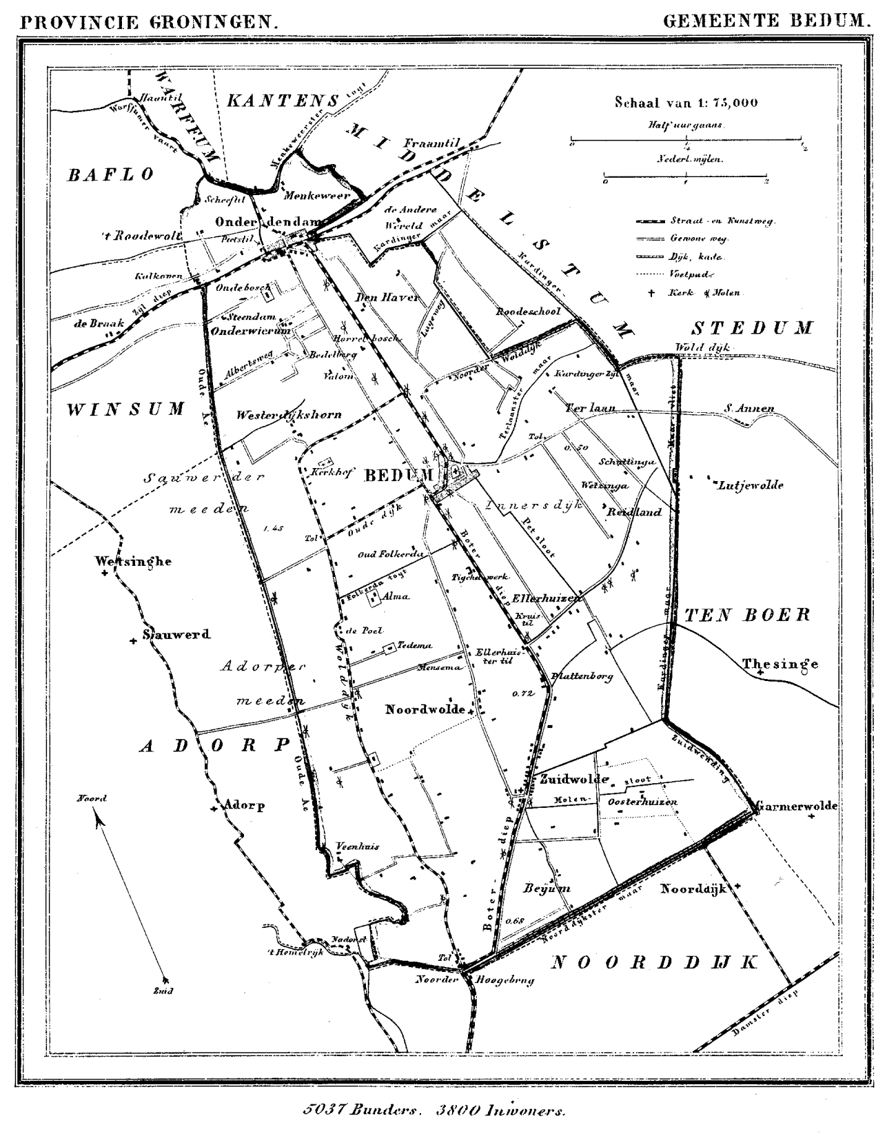 Kaart van Bedum (gemeente) uit Gemeente Atlas van Nederland, J. Kuyper 1865-1870, Uitgave Hugo Suringar Leeuwarden.